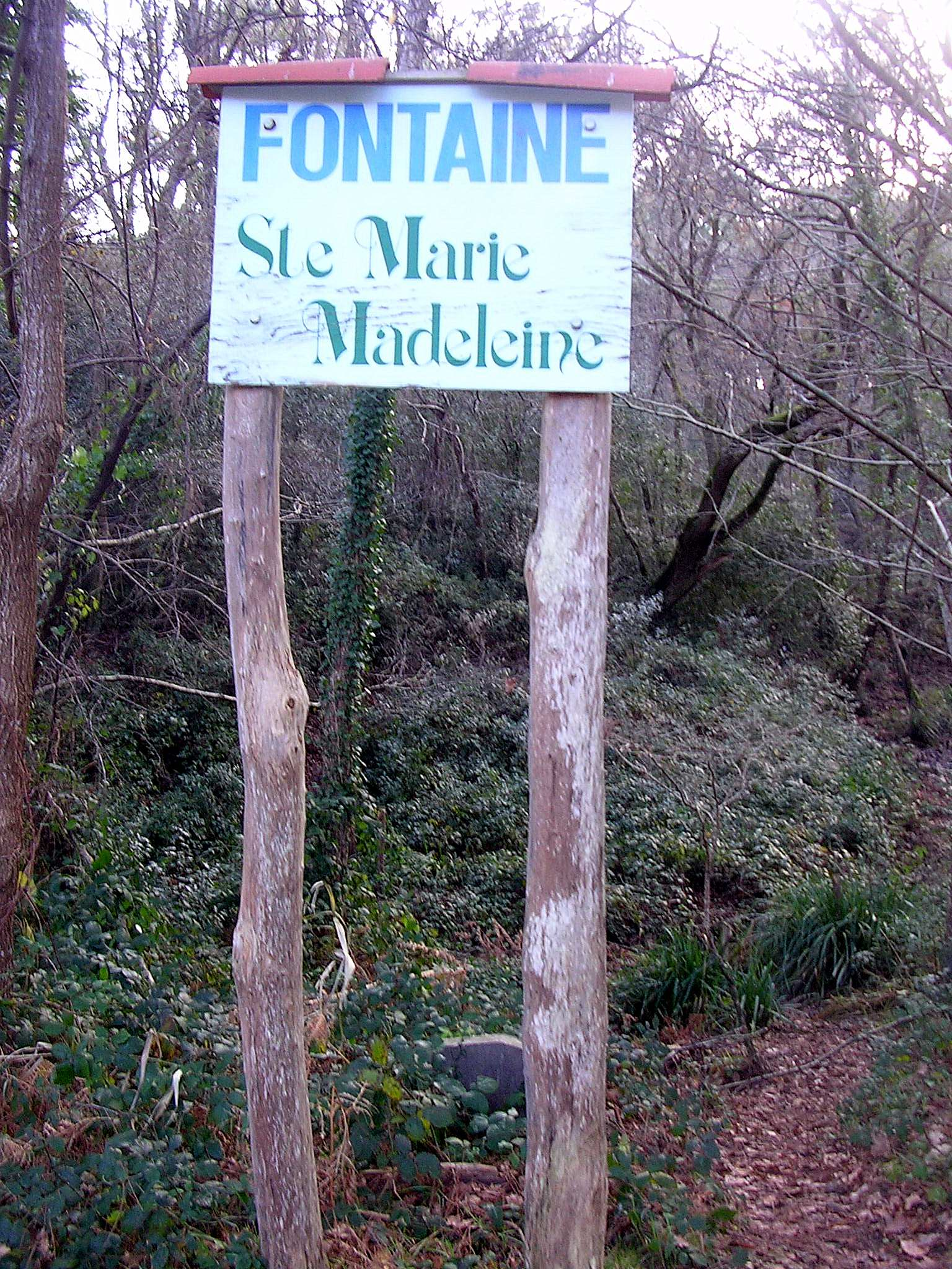 Panneau de la fontaine Sainte-Marie-Madeleine, à Contis, dans le département français des Landes.